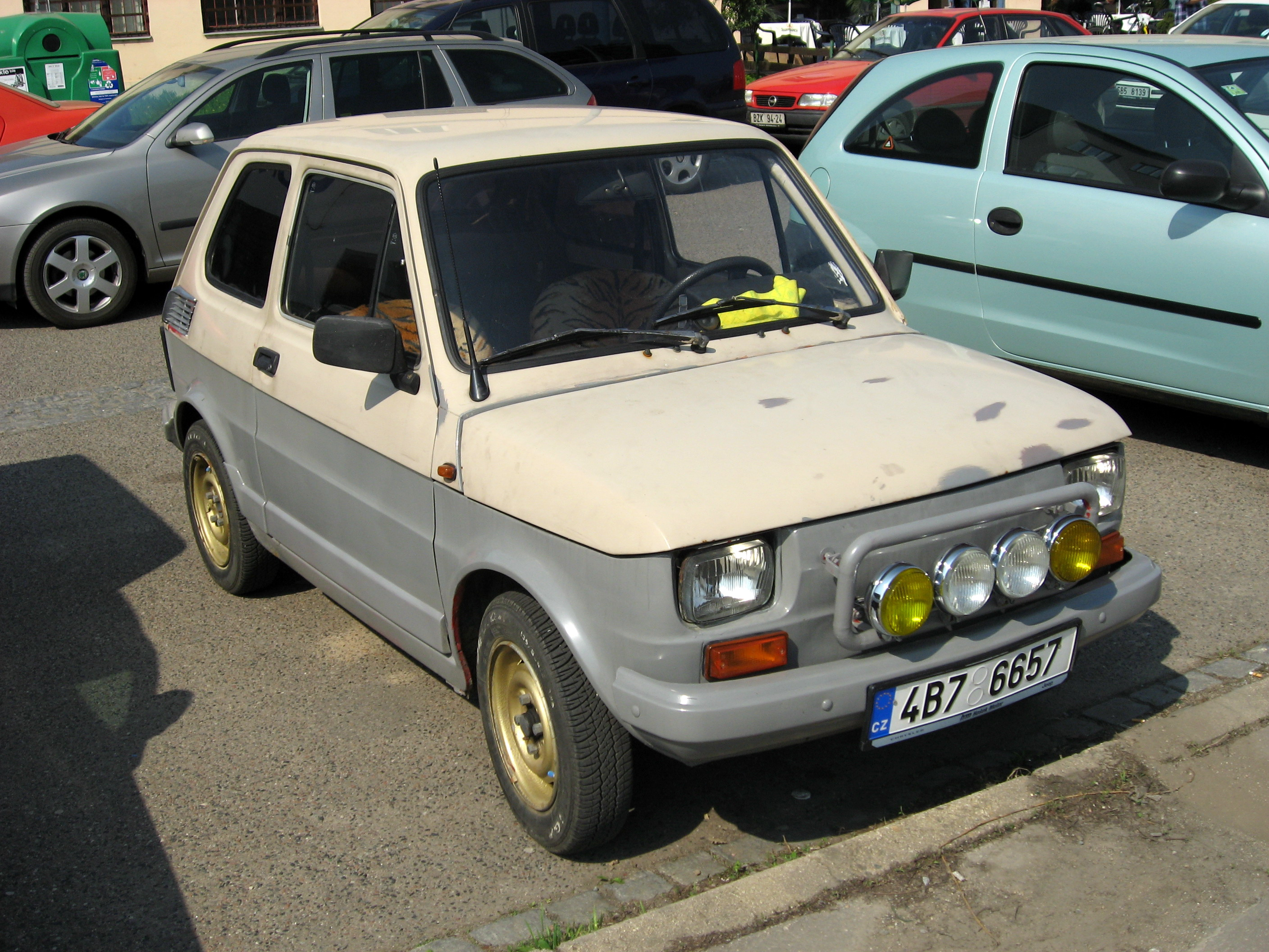 Polský Fiat 126p.